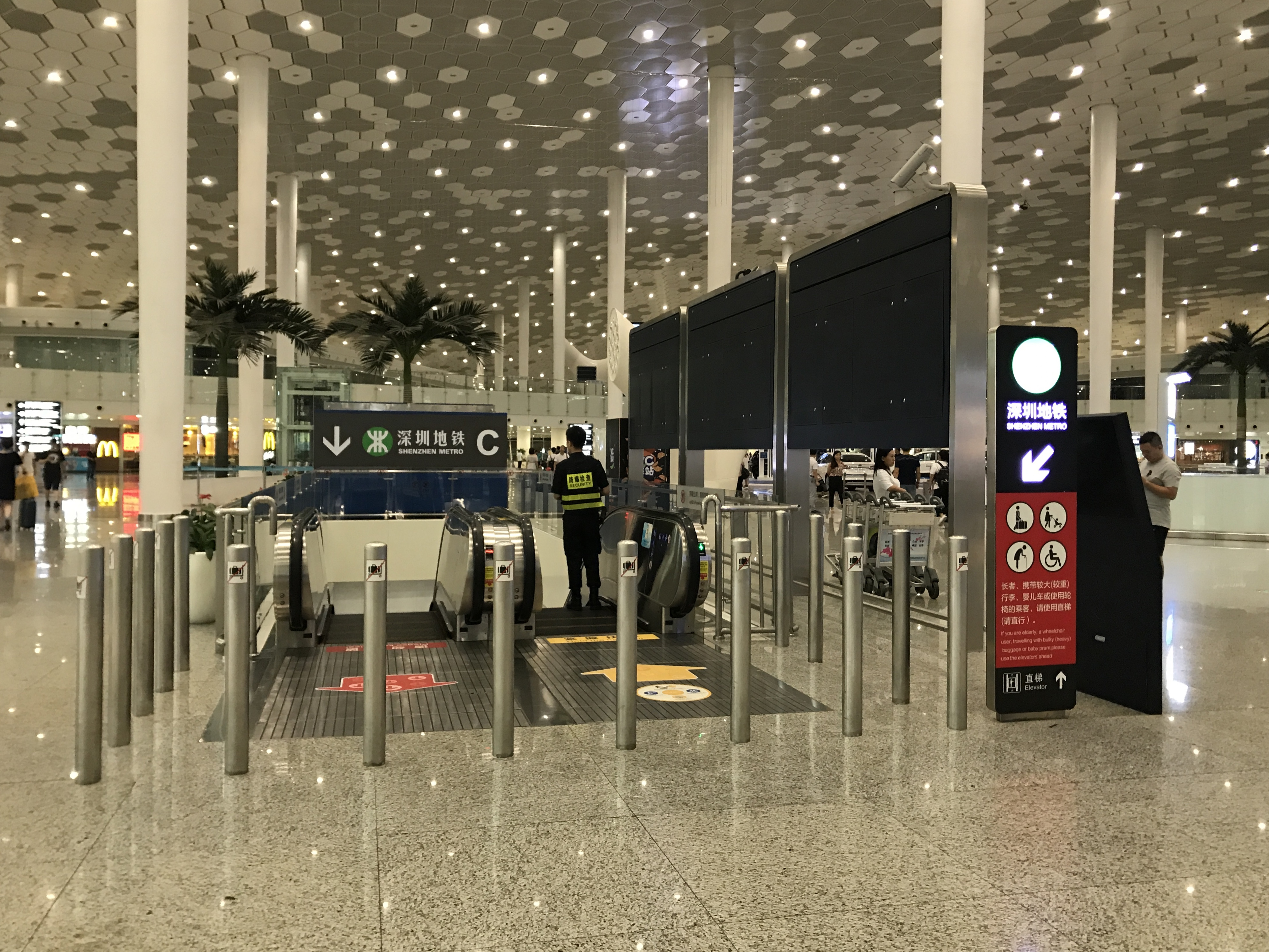 深圳宝安国際空港内の空港駅の3番入り口